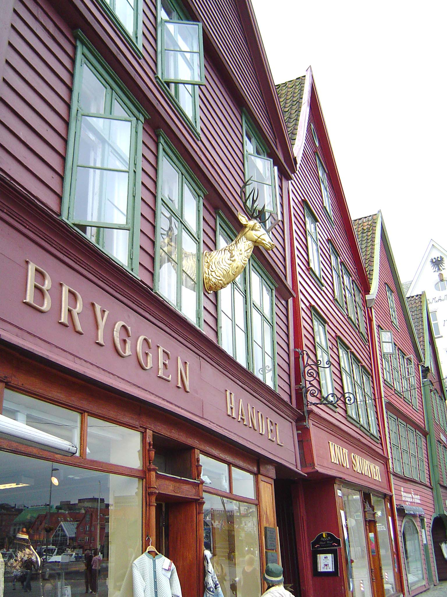 Heiserfassaden zu Bryggen (2004)